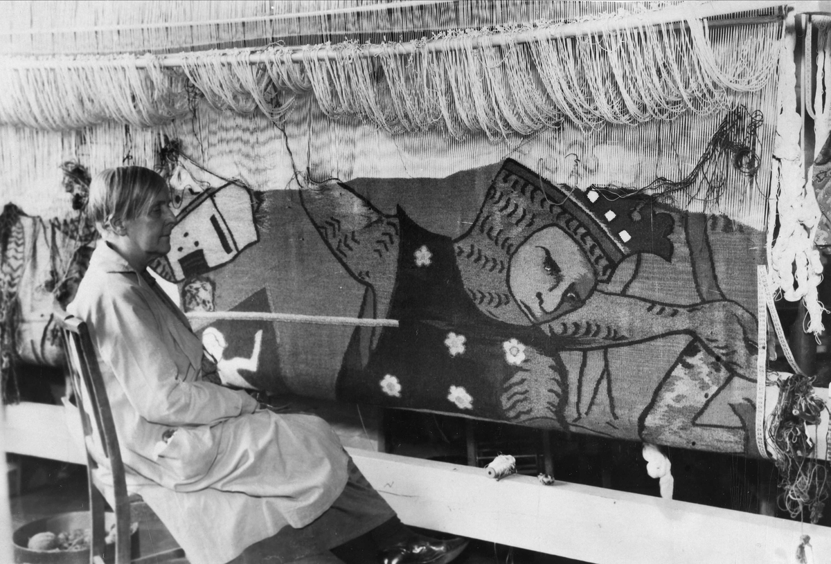 Ulrikke Greve fotografert ca. 1935 under arbeid med en av bildevevene til Hardråde-rommet i Oslo rådhus.